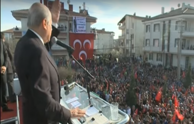 Devlet Bahçeli Aksaray'da halka hitap ediyor.